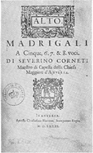 ALTO. / MADRIGALI / A Cinque, 6.7. & 8. voci. / DI SEVERINO CORNETI / Maestro di Capella della Chiesa / Maggiore d'ANVERSA. / IN ANVERSA. / Apresso Christofano Plantino / M. D. L.XXXI.